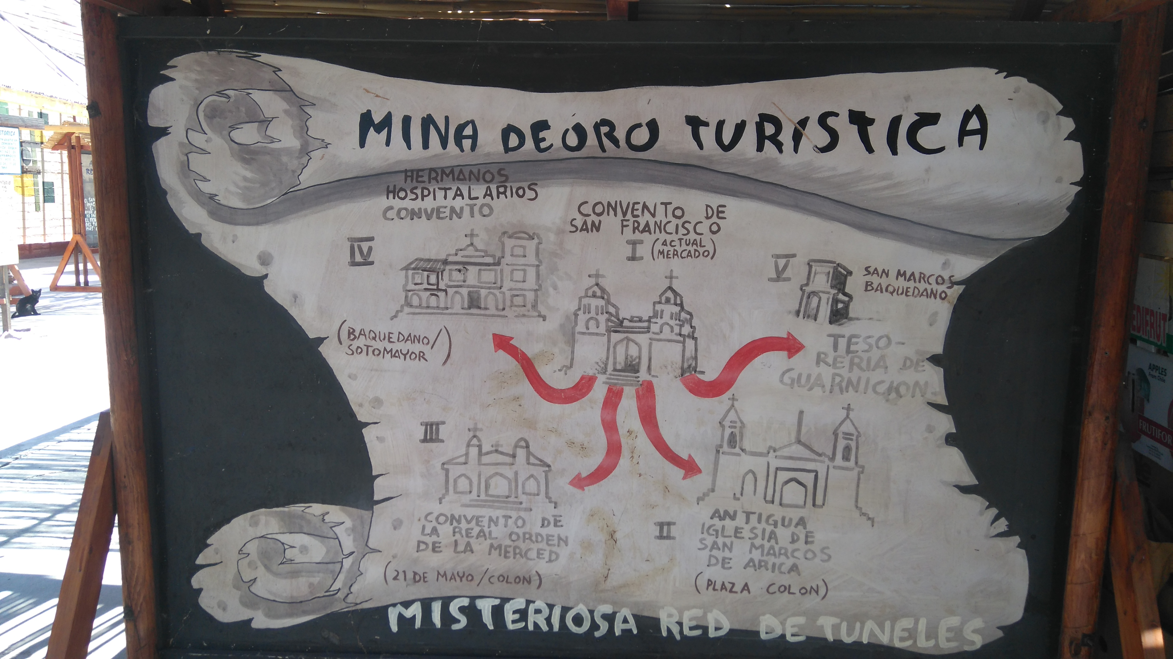 Mapa de túneles subterráneos en el Mercado Central de Arica, utilizados antiguamente como refugio y después como conexiones entre monasterios e iglesias.